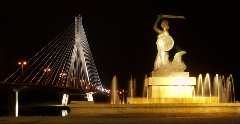 Stojący nad Wisłą pomnik Syreny autorstwa Ludwiki Nitschowej z 1938 roku.